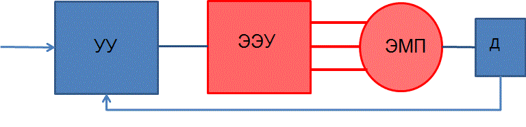 электромеханотронный преобразователь